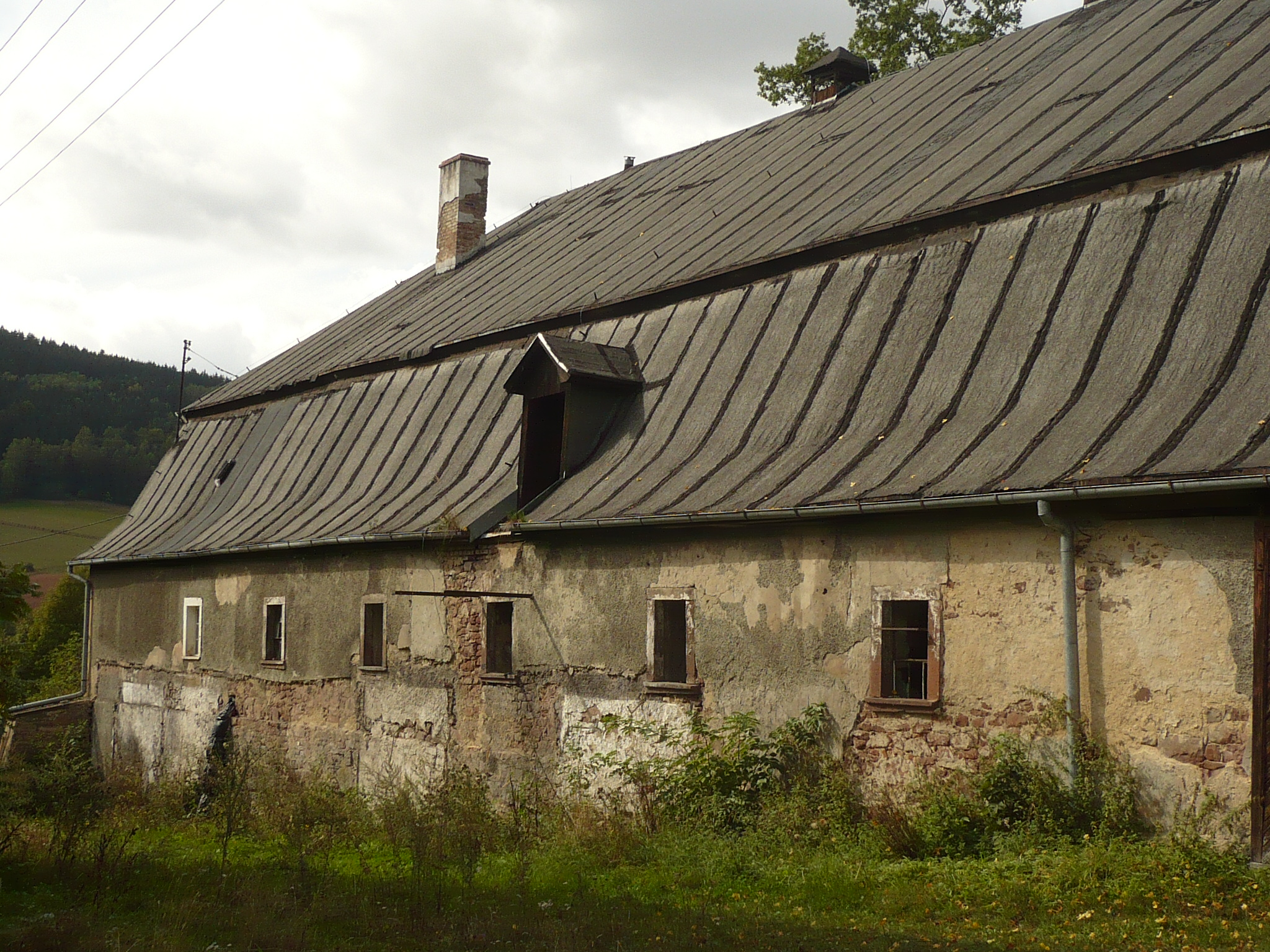 Sarny. Budynek gospodarczy